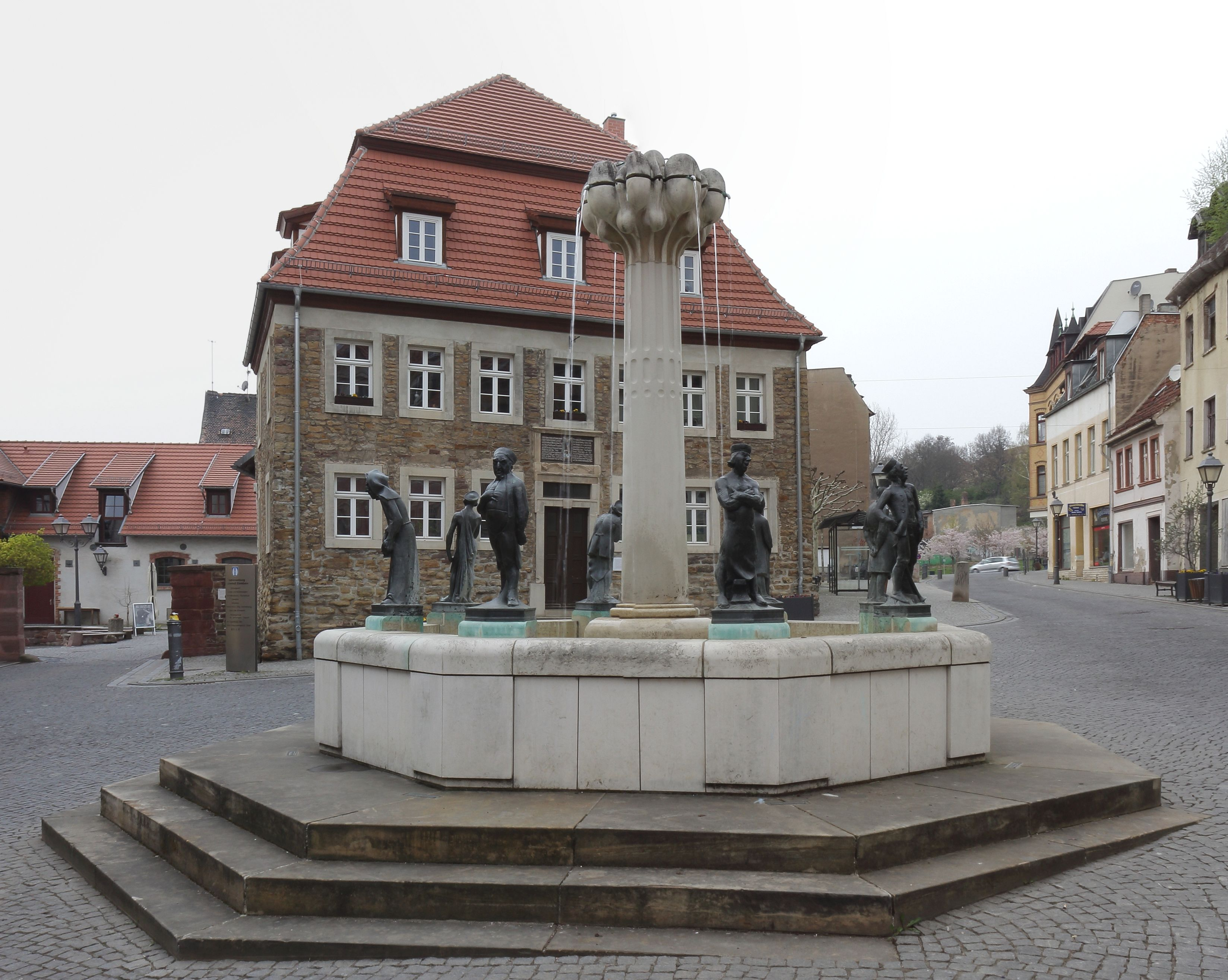 Knappenbrunnen (Wolfgang Dreysse) vor der Alten Bergschule, Eisleben